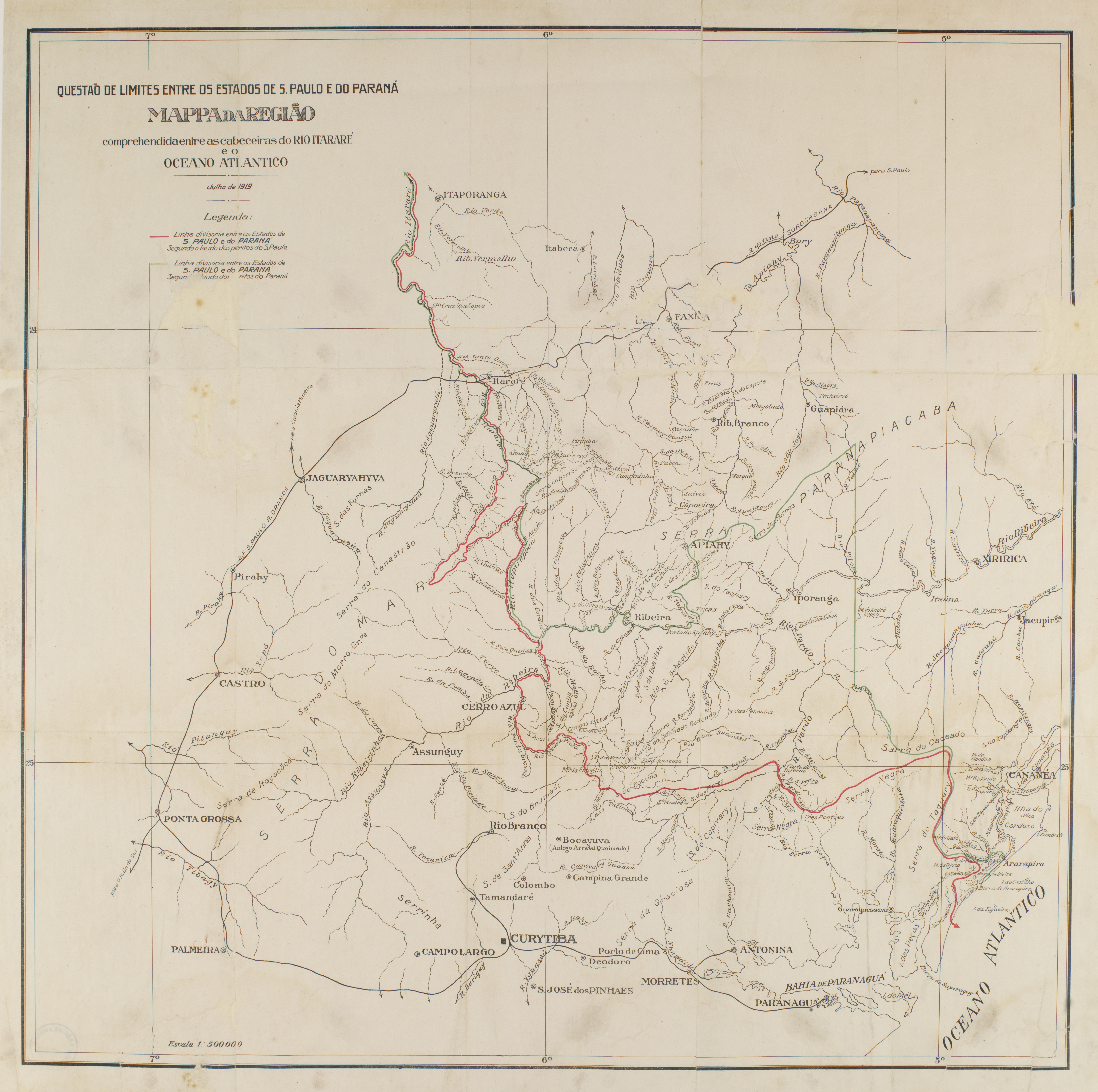 Obra que integra o acervo do Museu Paulista da USP. Coleção João Baptista de Campos Aguirra